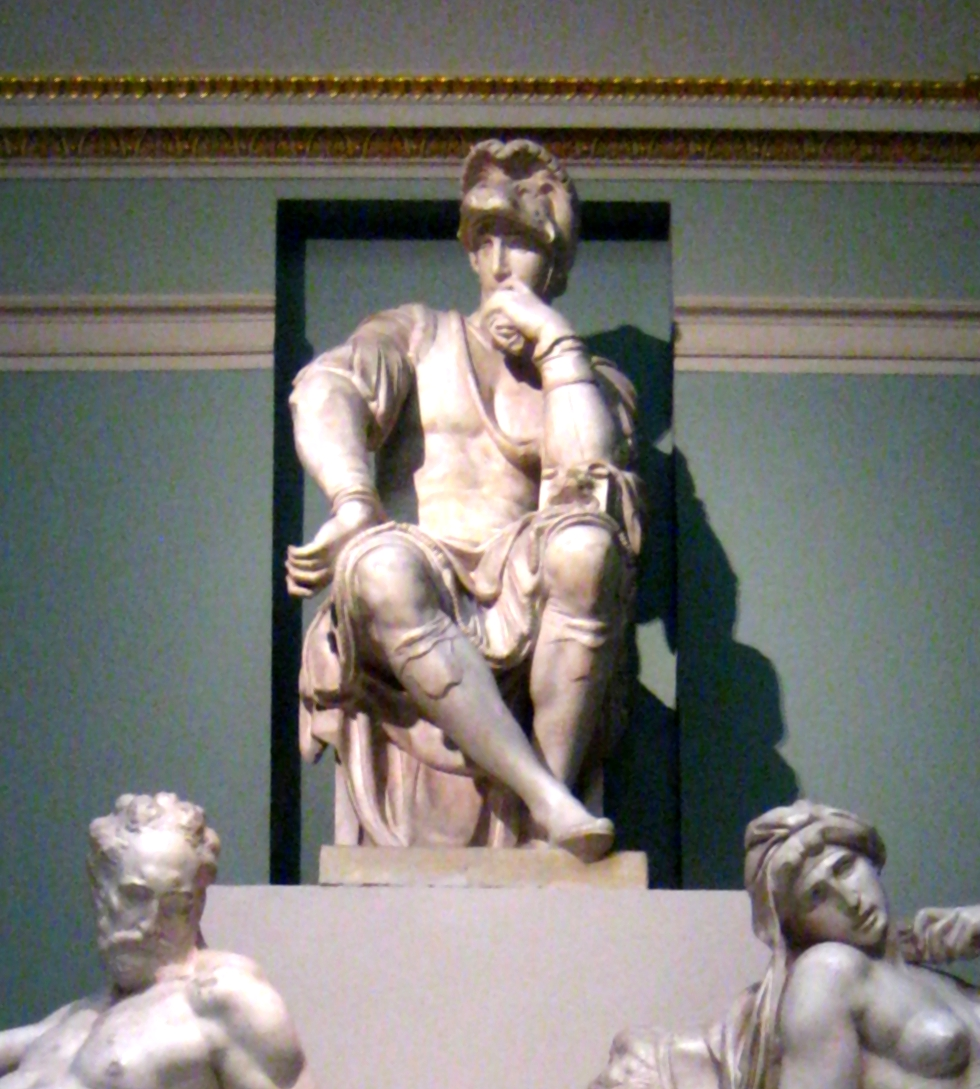 Tomb of Lorenzo de' Medici